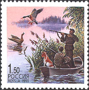 Охота на уток.